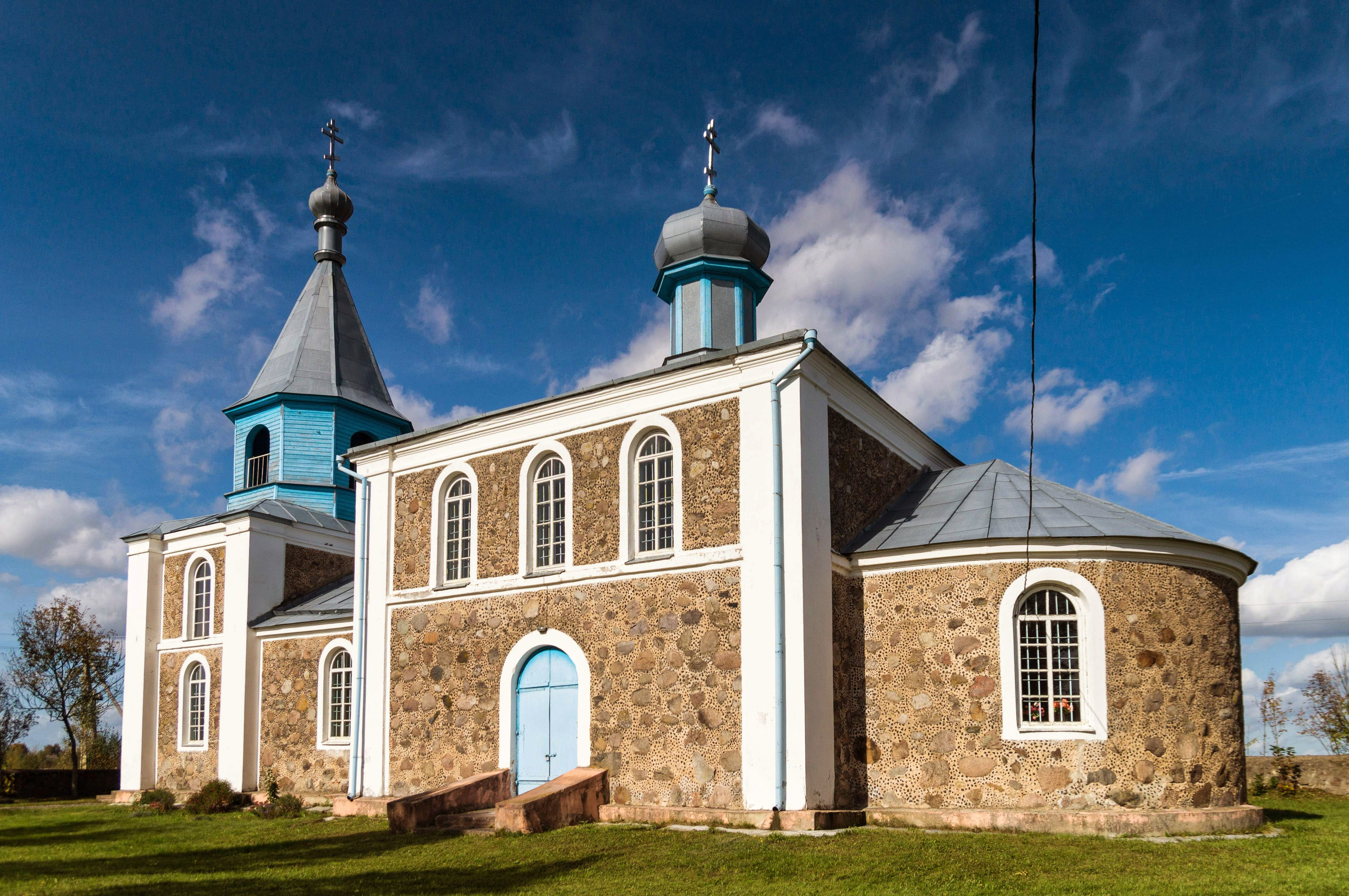 Свята-Раства-Багародзіцкая царква ў Мільчы